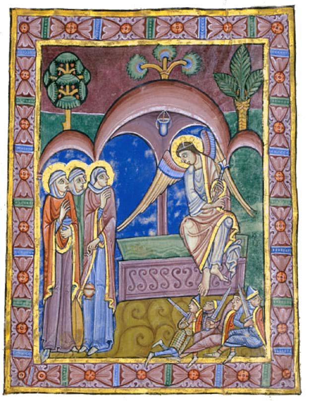 Albani-Psalter: Ostermorgen, die drei Frauen am Grab